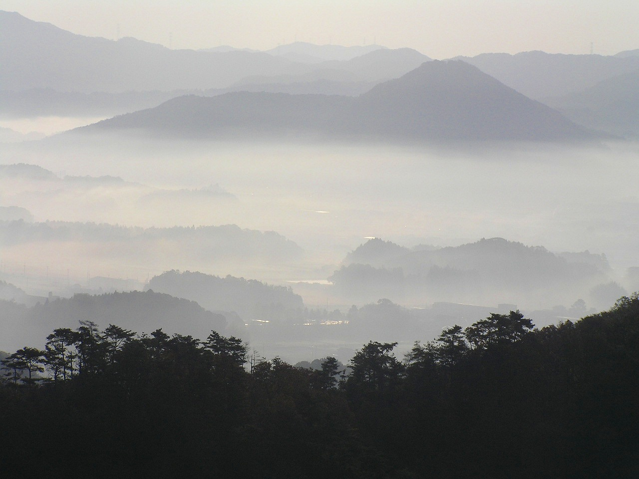 八上城（やかみじょう）は、兵庫県篠山市にあった中世山城。日本国指定の史跡。別名、八上高城。